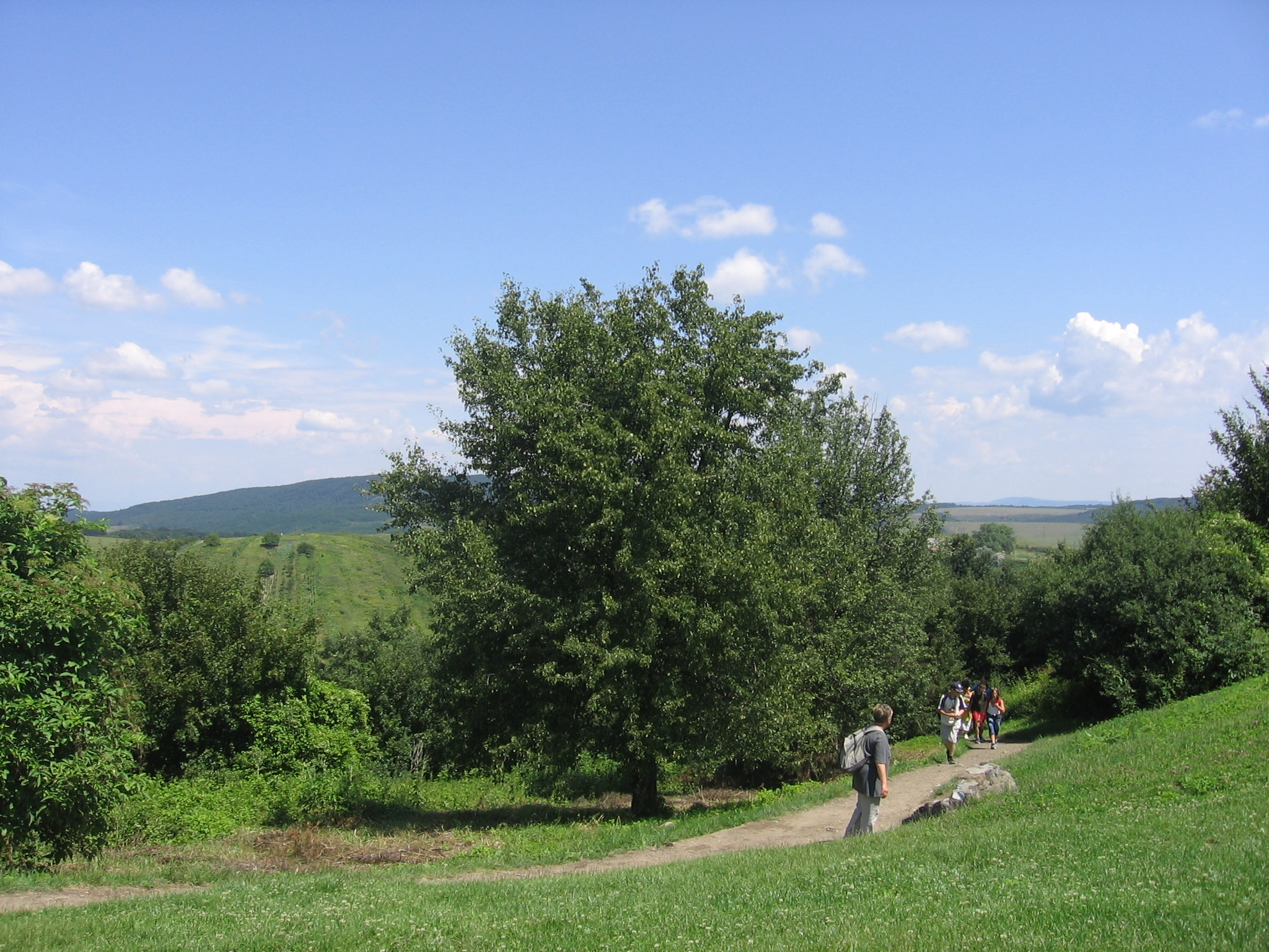 Cserhát Mountains, Northern Hungary, near Hollókő village A Cserhát, Észak-Magyarországon. Aránylag közel Hollókőhöz.